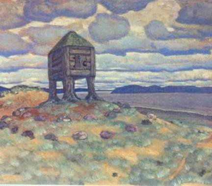 sketch